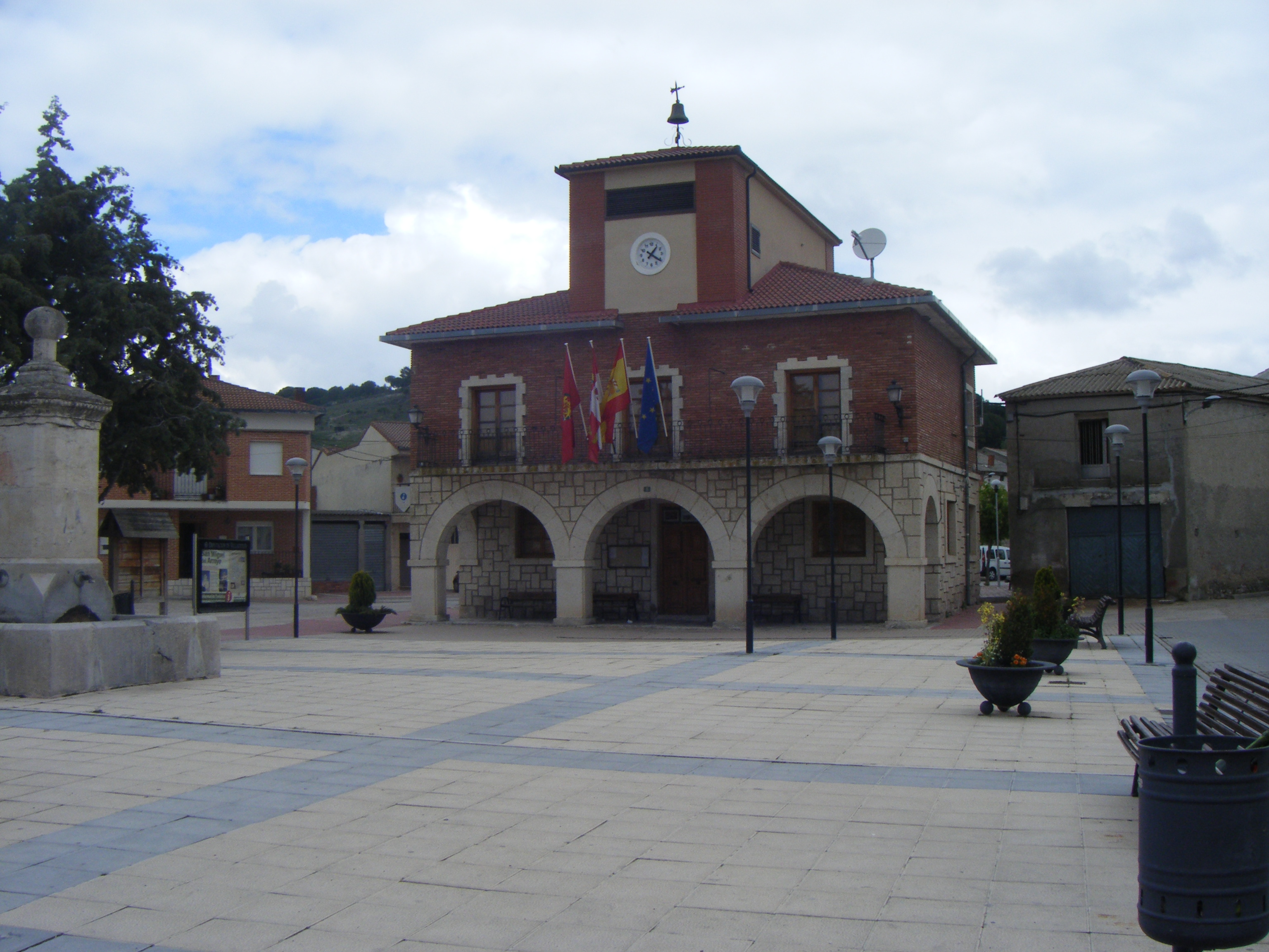 Udaletxea.